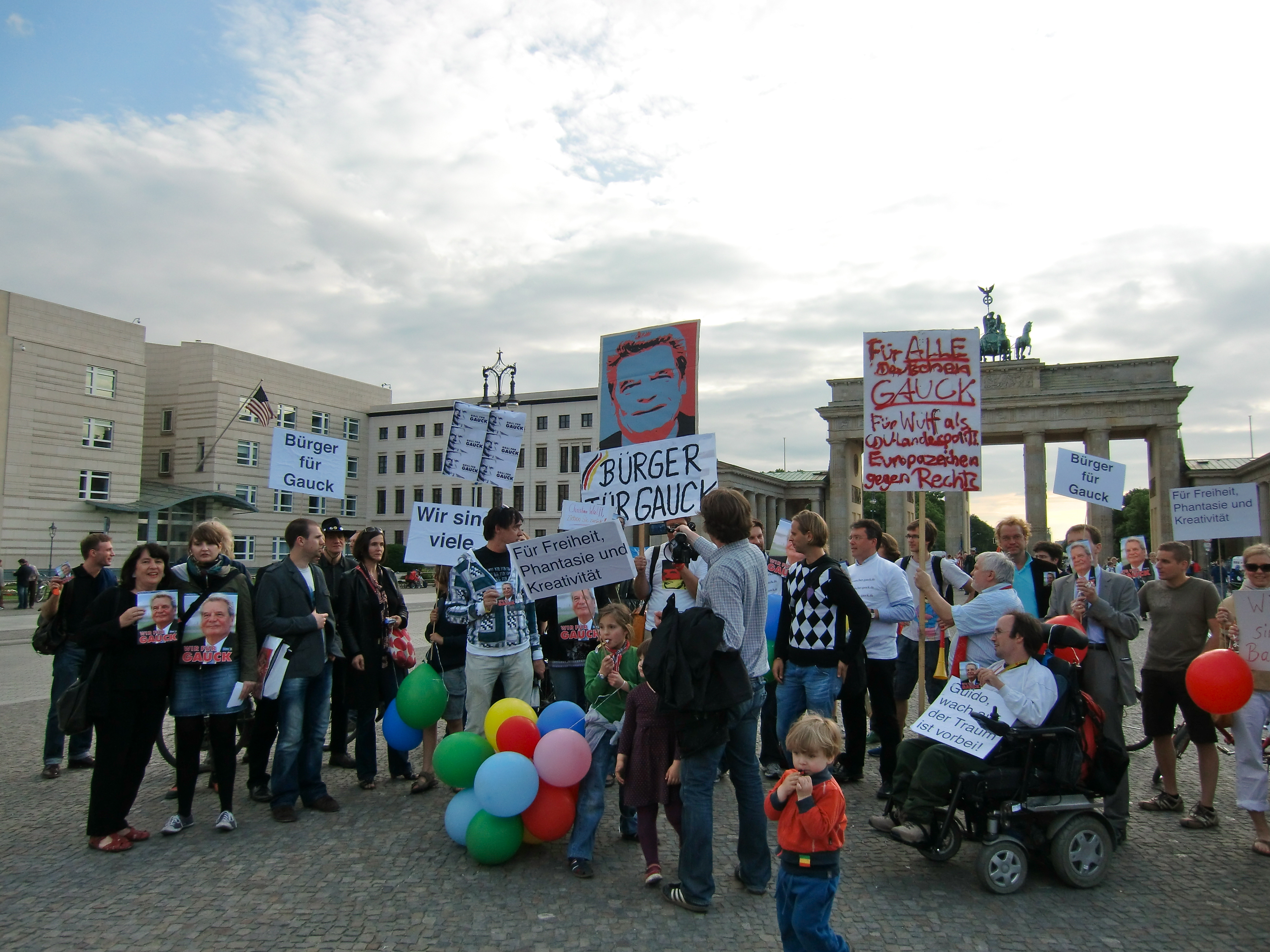 Montagsdemo in Berlin, 14. Juni 2010